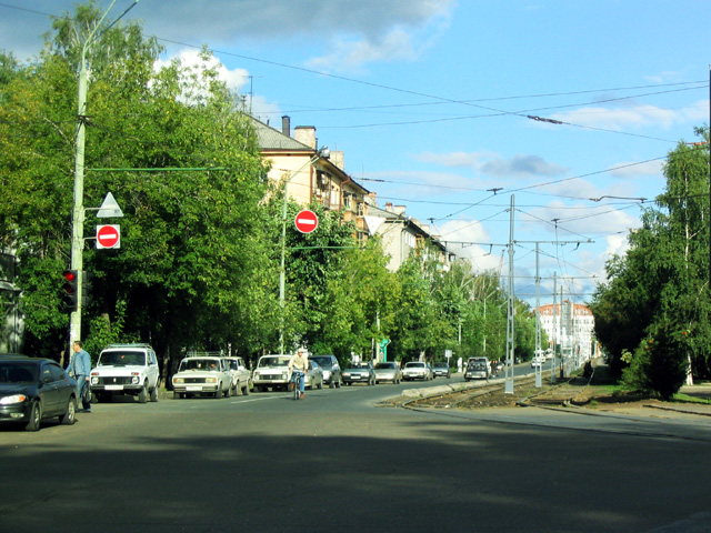 Kirov ave in Tomsk